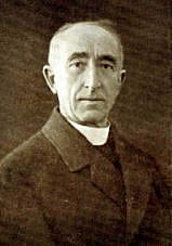 František Bernard Vaněk (1872 - 1943), Český kněz, spisovatel a kulturní organizátor.